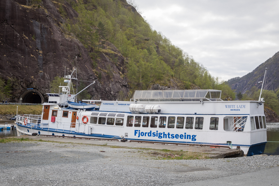 MS «White Lady» i Fjæra i mai 2020.